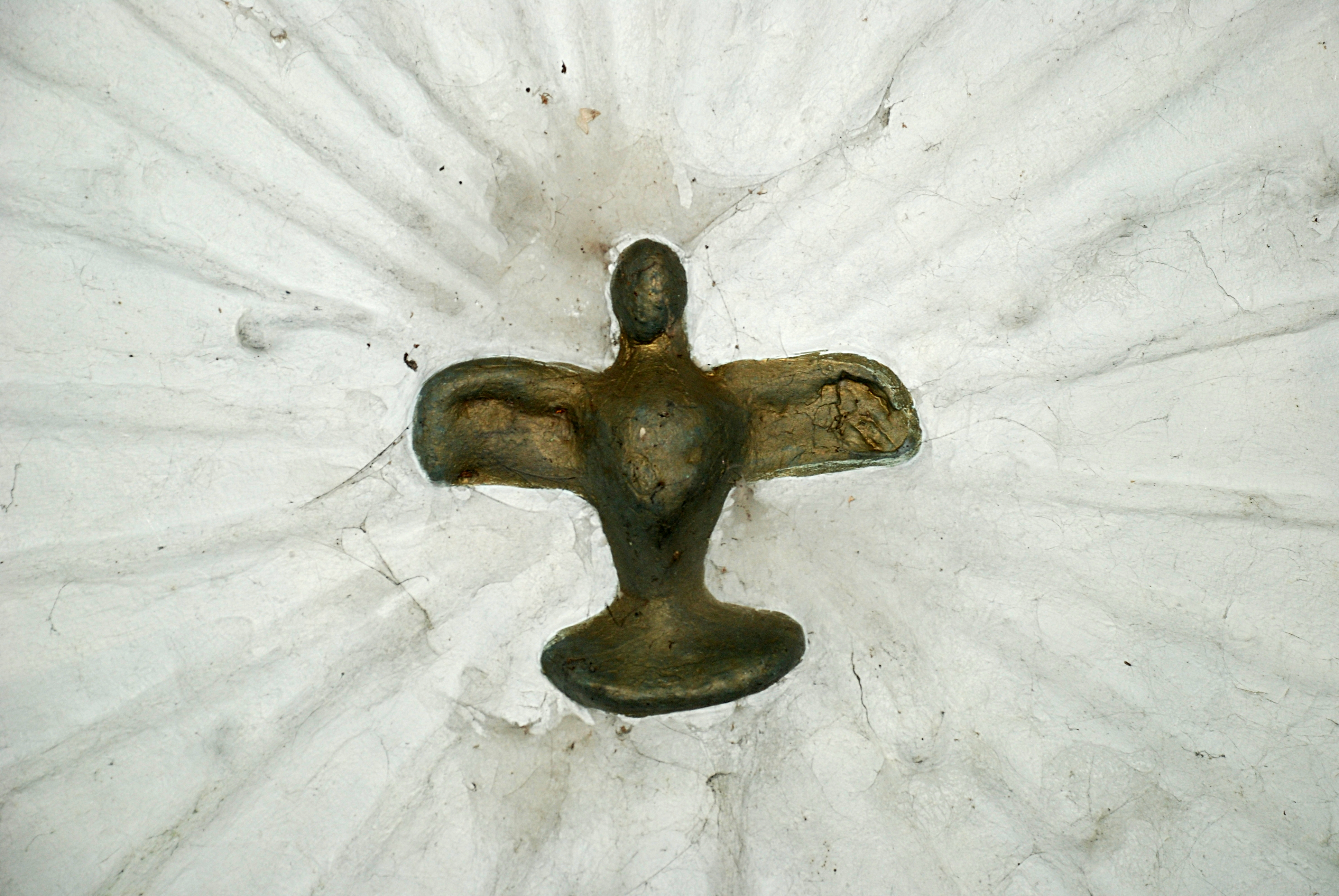 Belgique - Brabant wallon - Villers-la-Ville - Chapelle Notre-Dame des Affligés